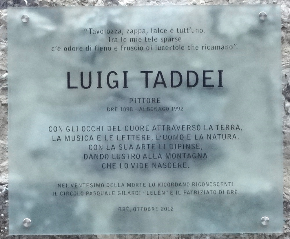 Plaque dédiée au peintre Luigi Taddei (1898-1992), 2012.